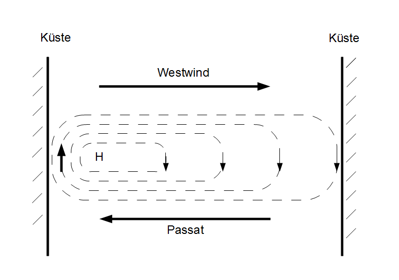 Schema der Bildung eines asymmetrischen ozeanischen Hochdruckrückens unter dem Einfluß von Rossbywellen